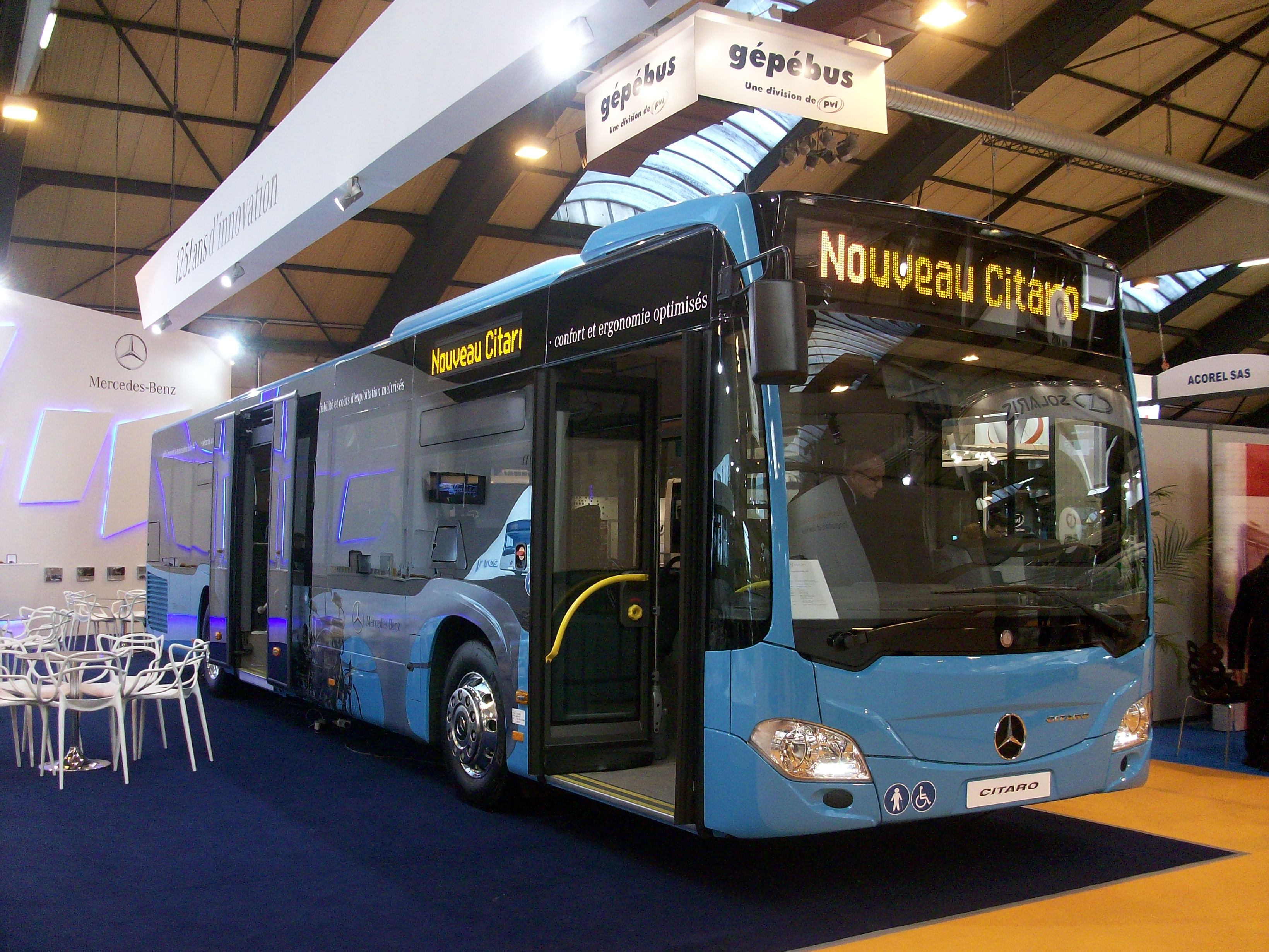 Mercedes-Benz Citaro nouvelle génération exposé aux 23e RNTP, Strasbourg